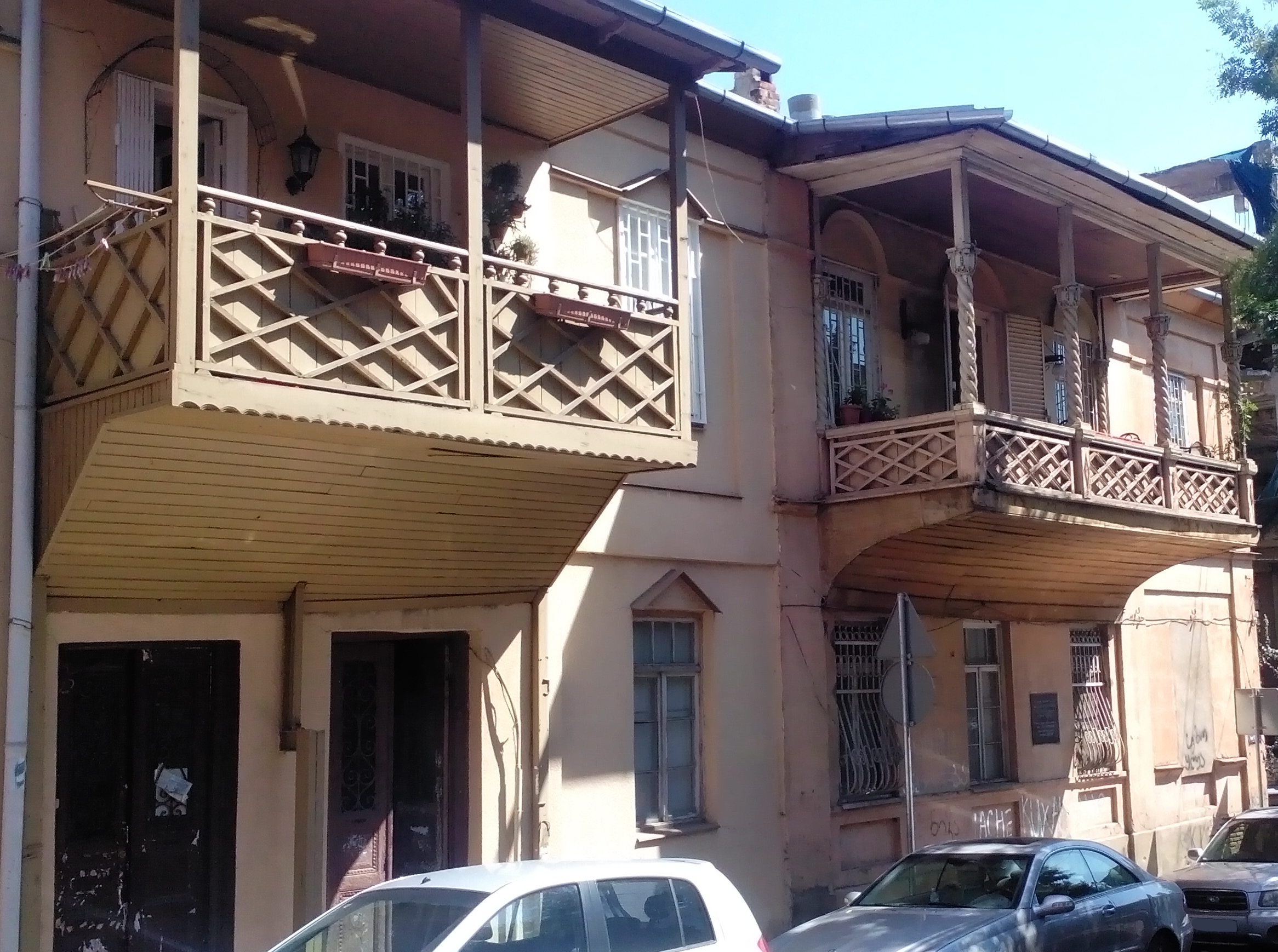 საცხოვრებელი სახლი